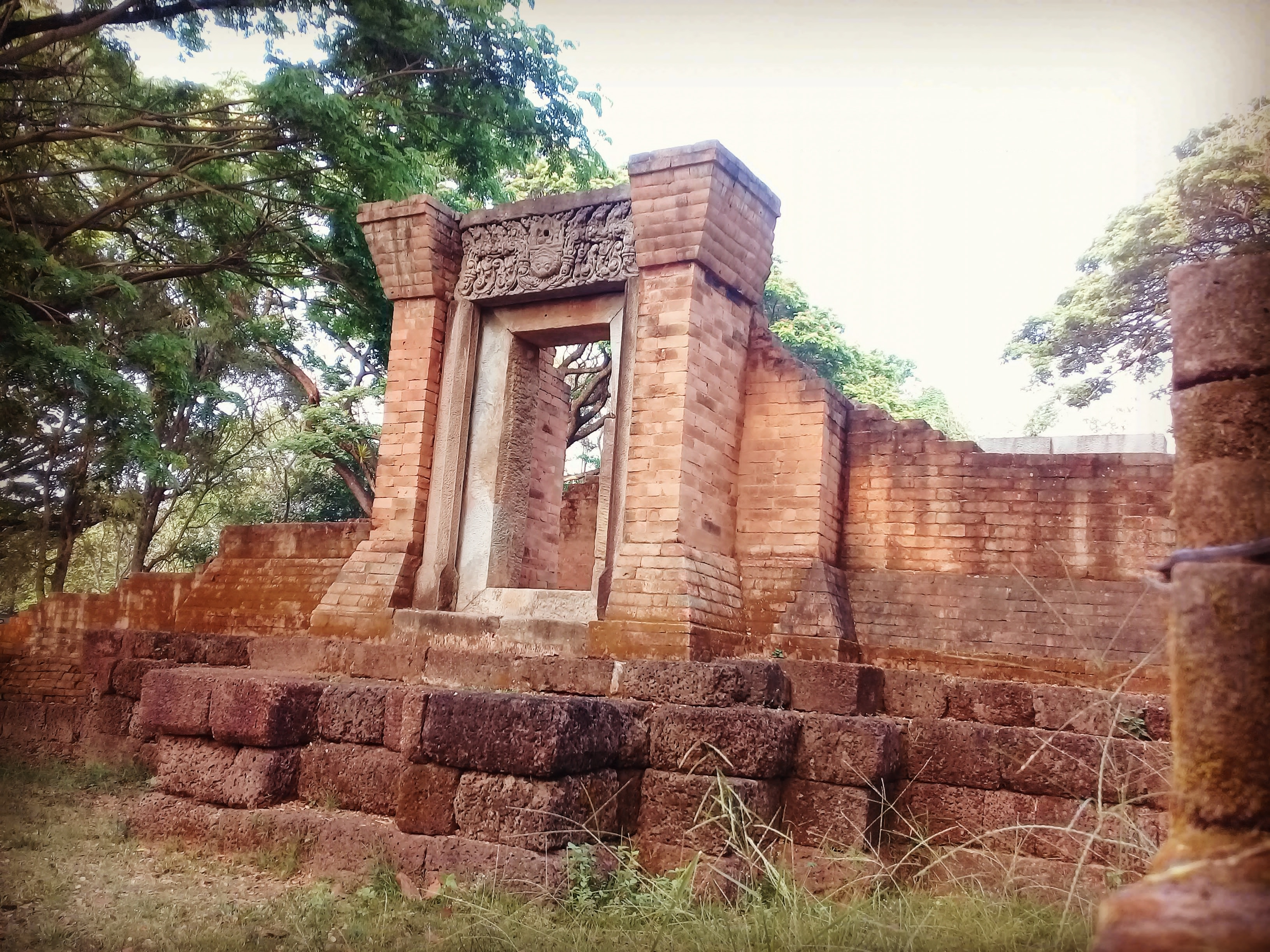 ปราสาททอง ตั้งอยู่บริเวณด้านหลังตลาดสดเทศบาลตำบลบ้านกรวด สันนิษฐานว่าสร้างขึ้นในช่วงปลายพุทธศตวรรษที่ 16 มีการขุดพบทับหลังในสภาพสมบูรณ์